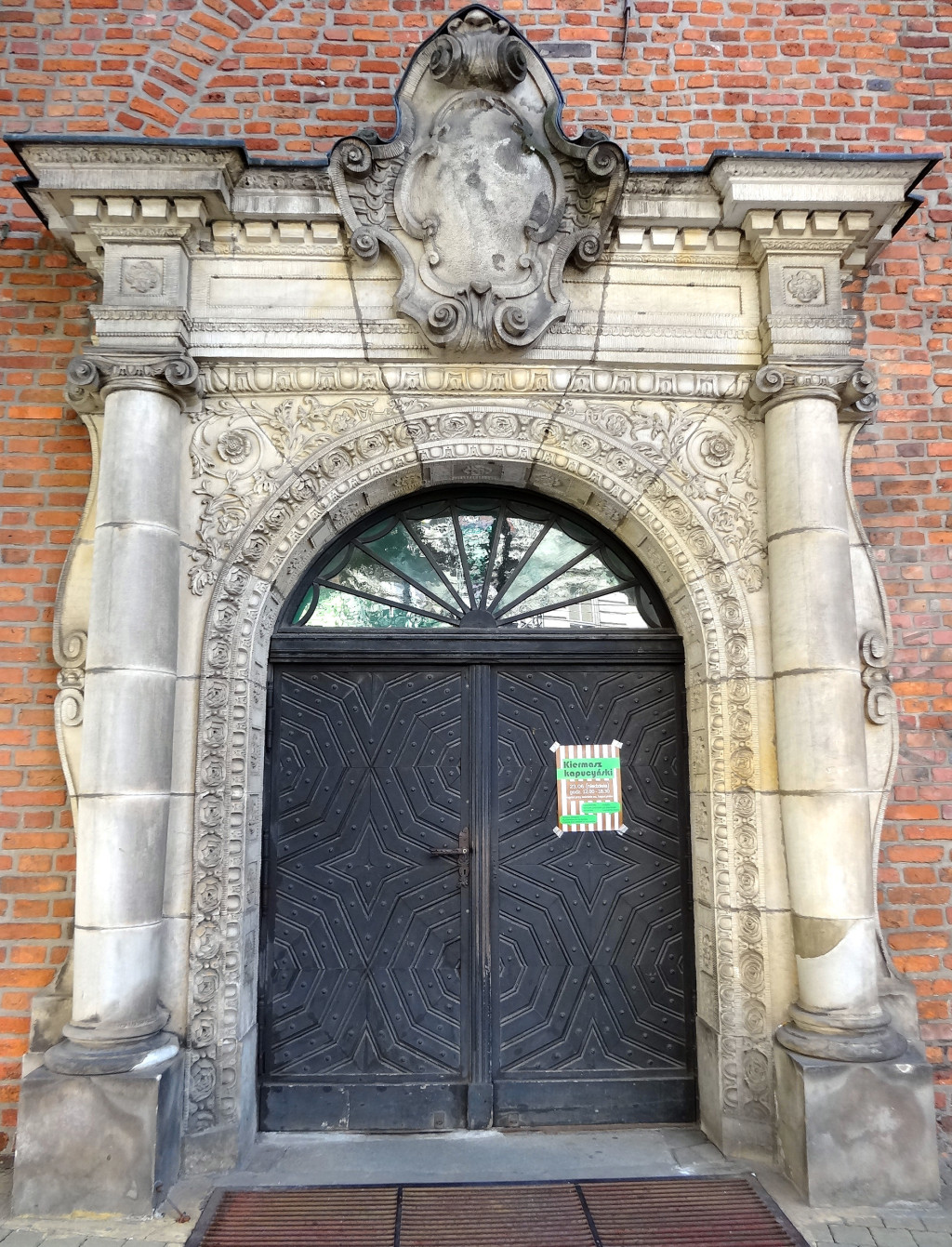 Kościół p.w. Wniebowzięcia Najświętszej Marii Panny w Bydgoszczy (zbud. 1582-1615, do 1835 r. kościół klasztorny klarysek bydgoskich)